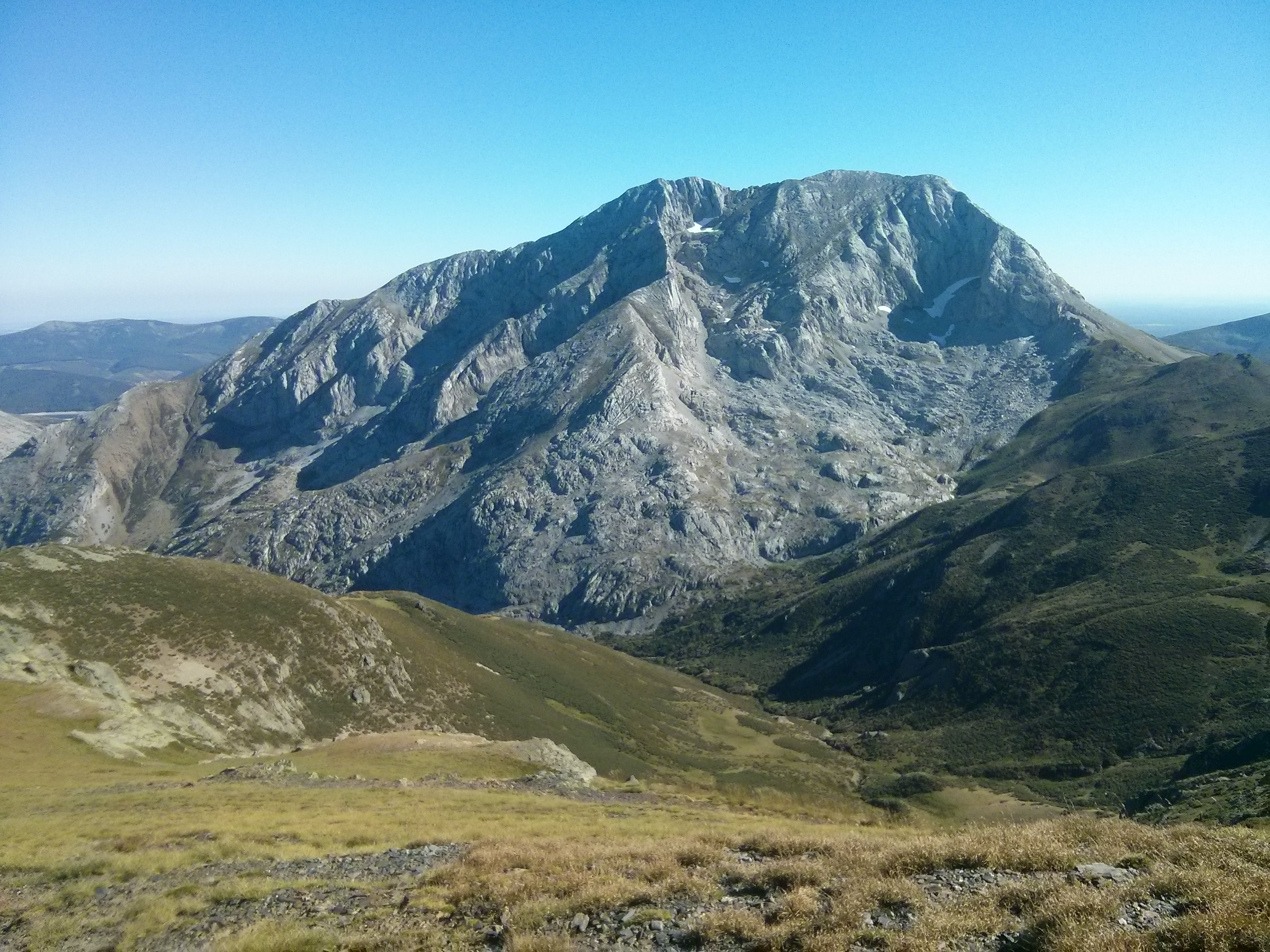 Vista el pico Espigüete desde el cordal de La Cerezuela. Norte de Palencia (España).